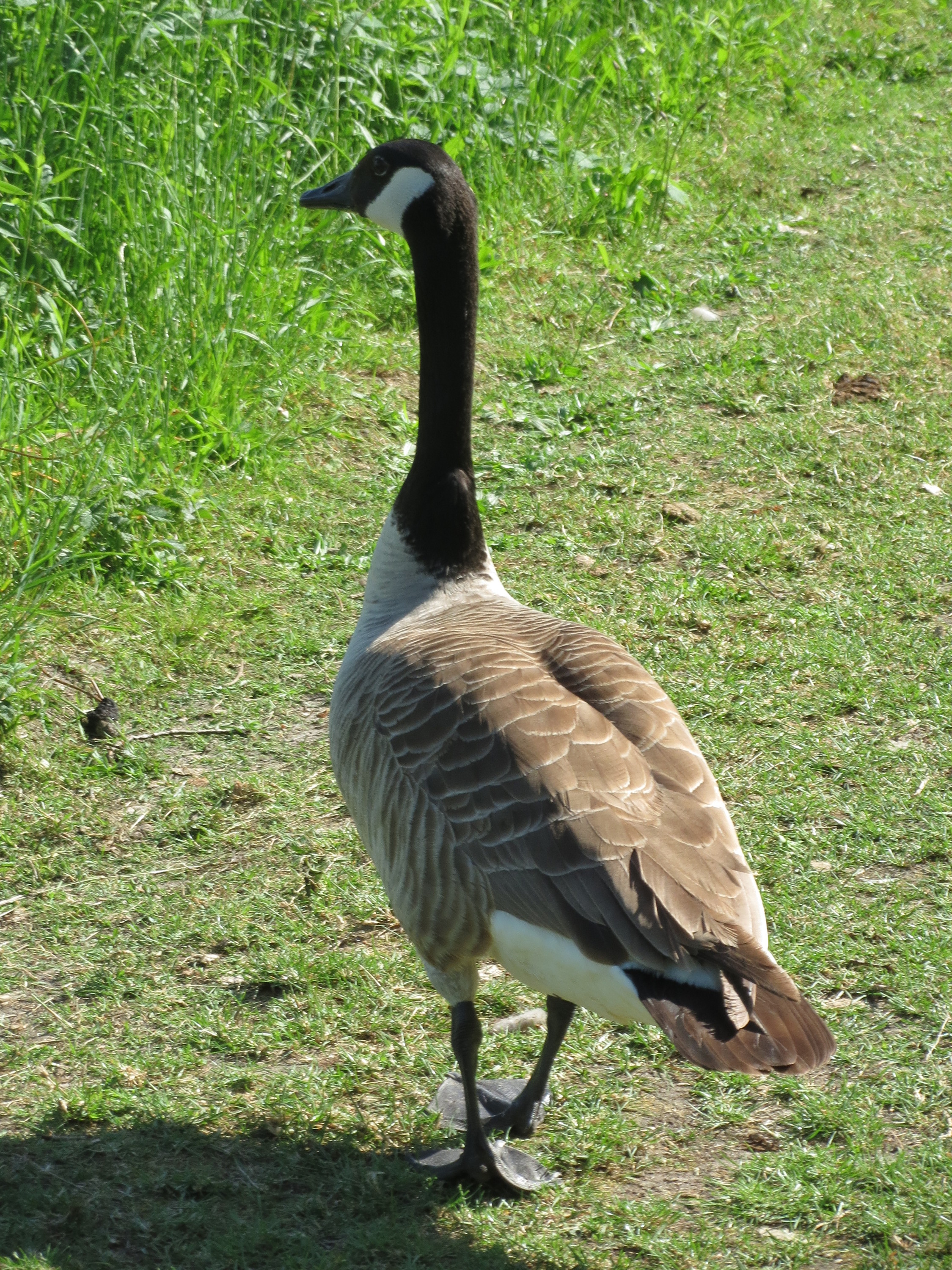 Kanadagans (Branta canadensis) im Naturschutzgebiet Wagbachniederung